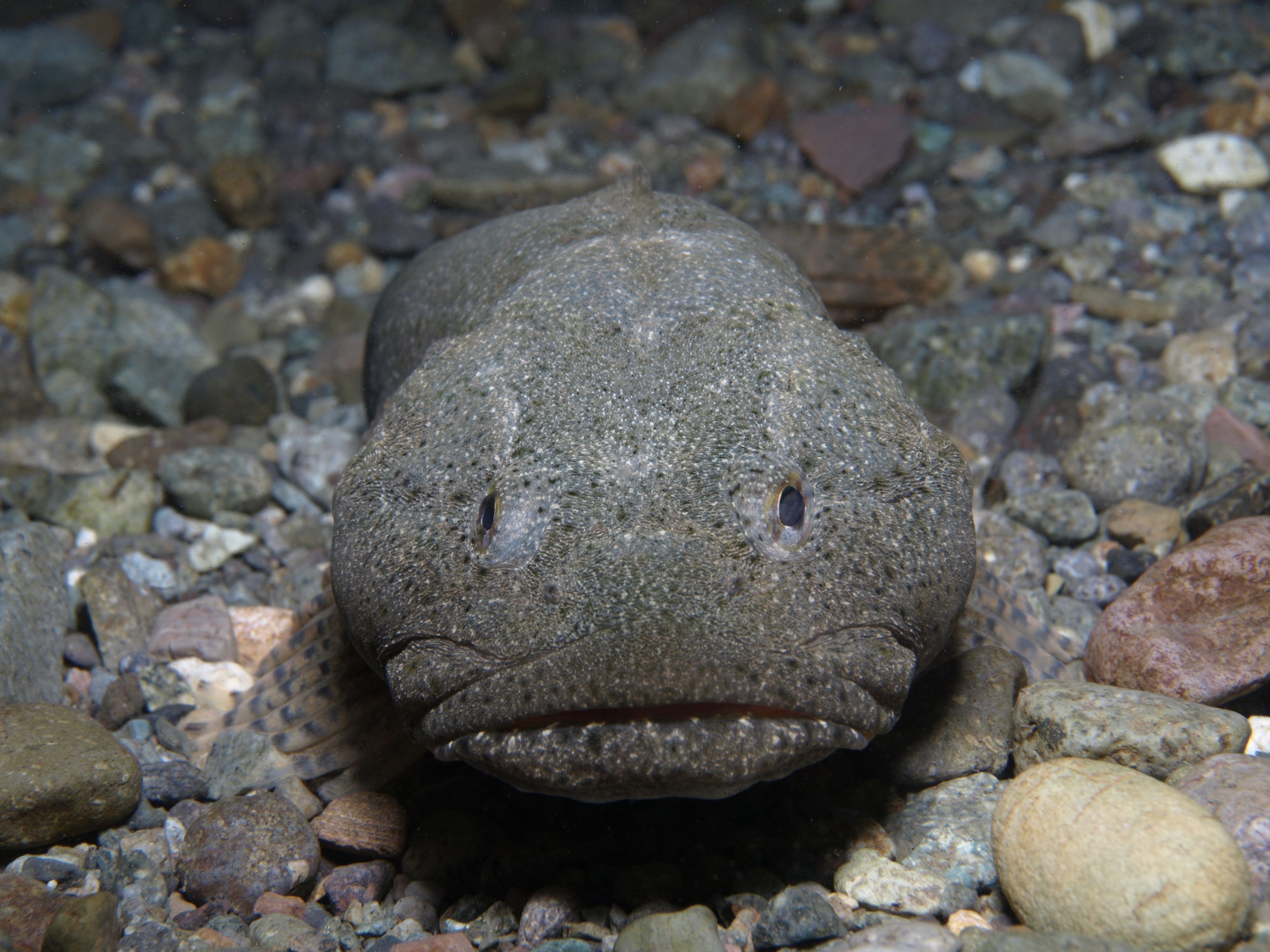 石化けするアユカケ、佐渡ヶ島。詳細